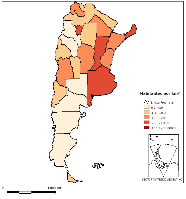 En este mapa de la República Argentina se representa la densidad de población, según el CENSO 2010.